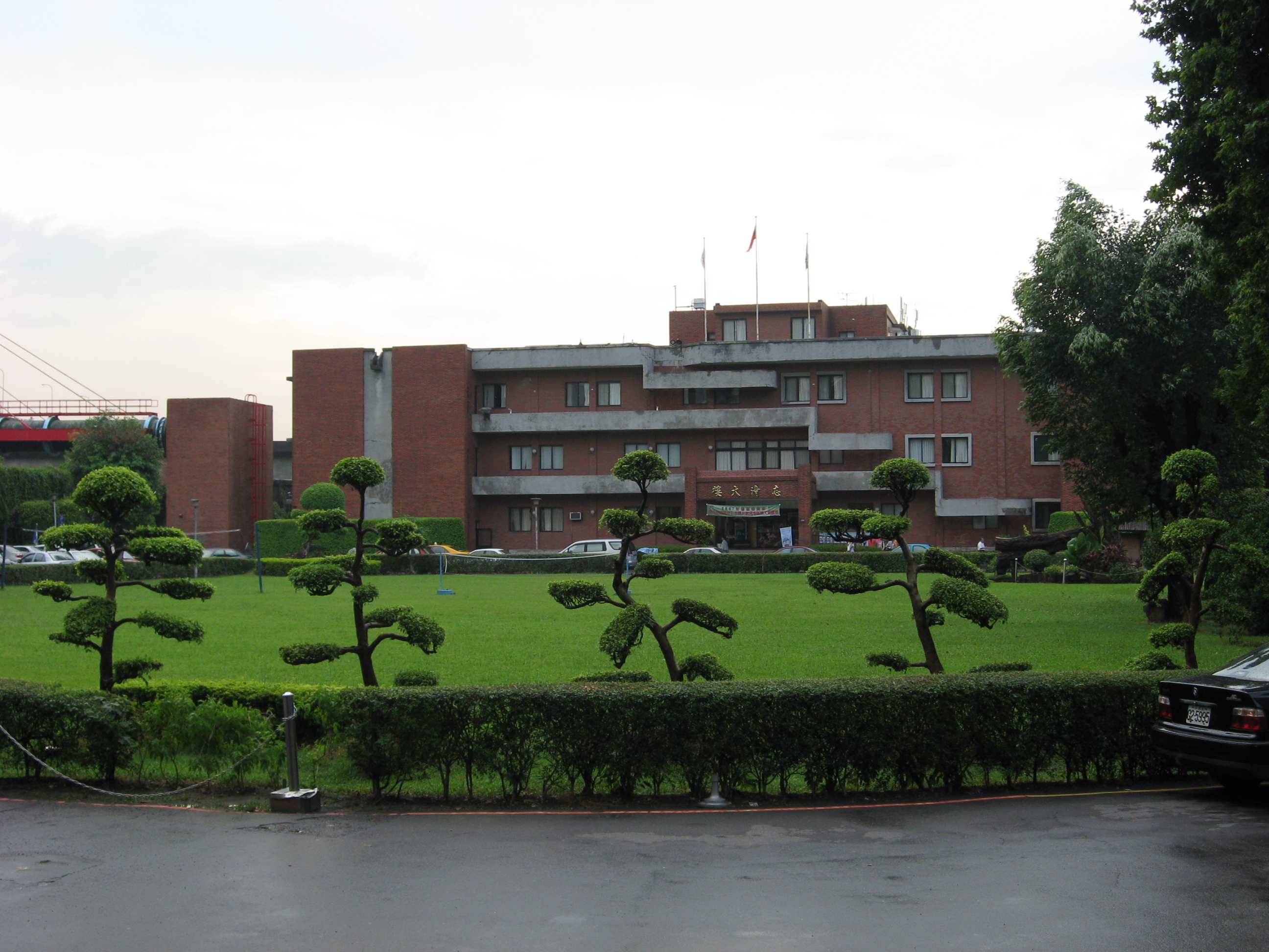 劍潭海外青年活動中心志清大樓。